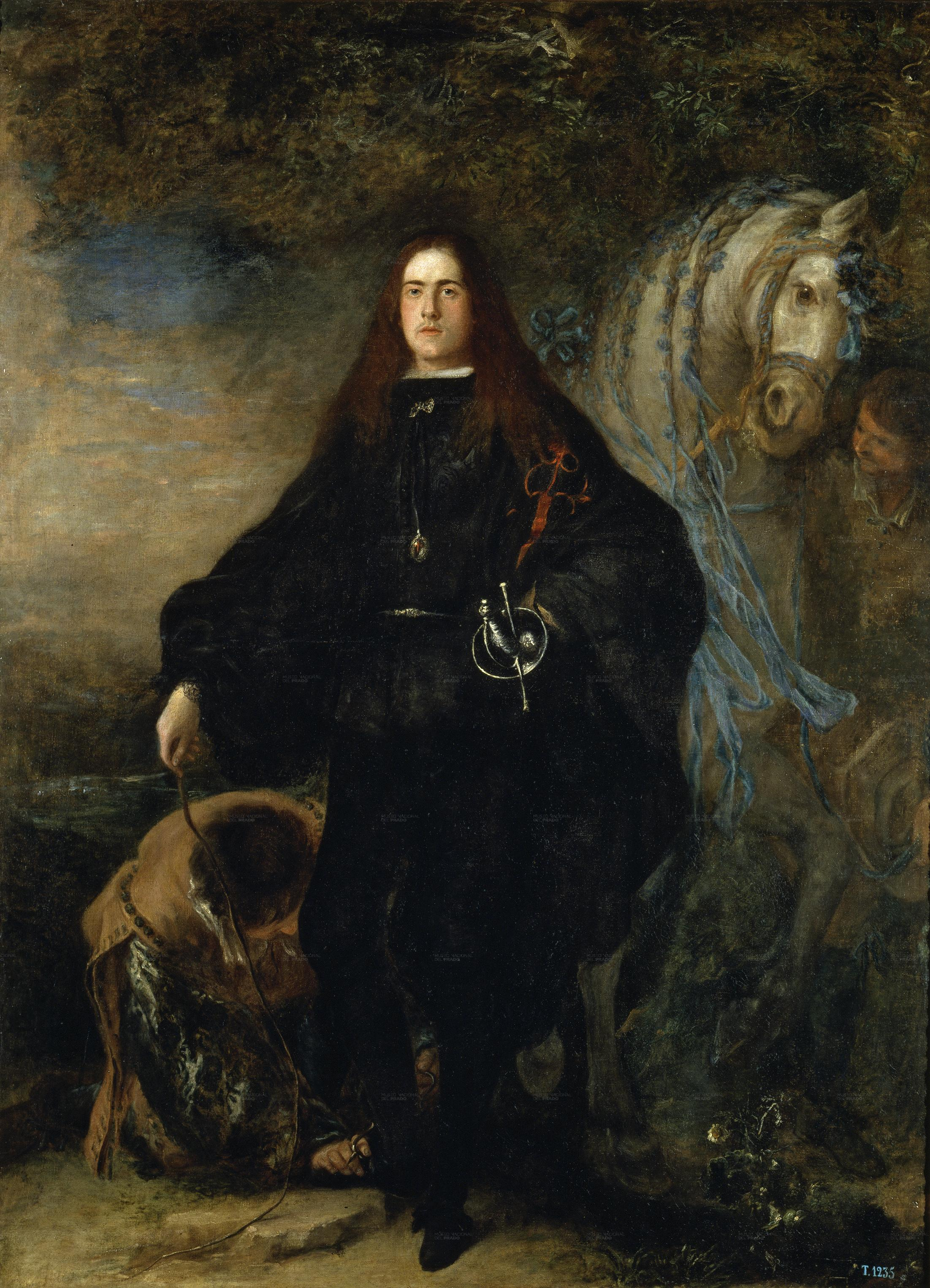 Retrato del aristócrata español Gregorio de Silva y Mendoza (1649-1693), V duque de Pastrana y IX duque del Infantado.